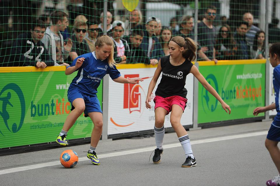 Zwei Teilnehmerinnen beim buntkicktgut-open: UniCredit-Cup 2015 auf der Leopoldstraße in München.